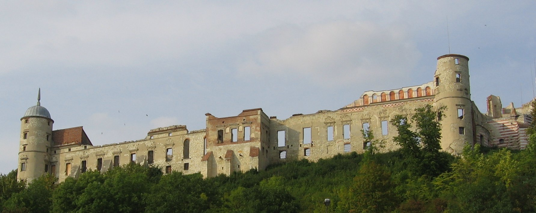 Janowiec - ruiny zamku